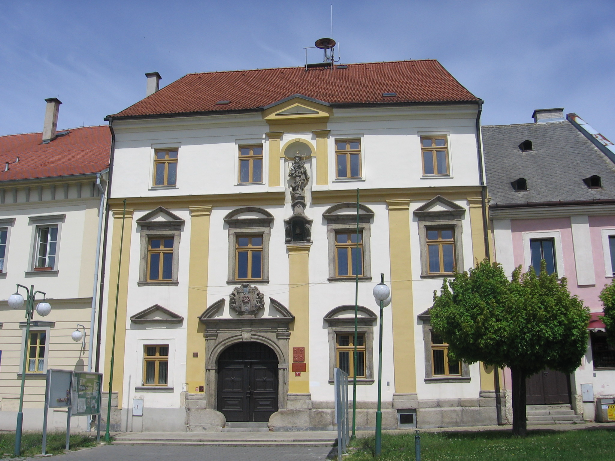 Radnice, nám. 1, Bor, okr. Tachov